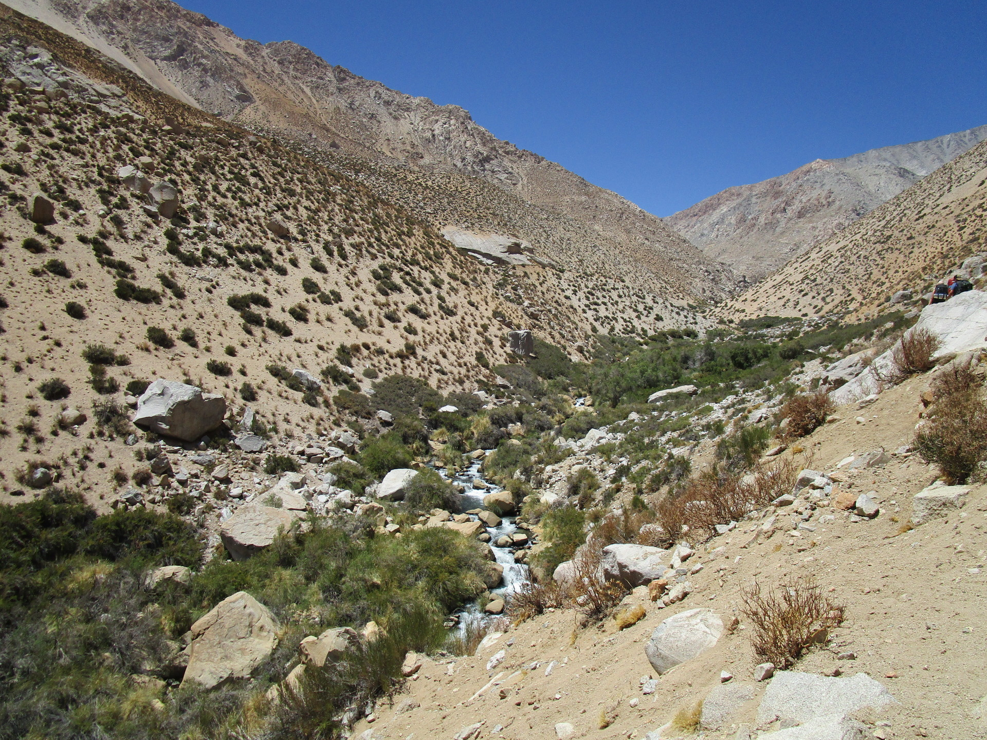 Schmelzwasser aus den Anden nährt den Fluss während die Berge gelb und vegetationslos sind.